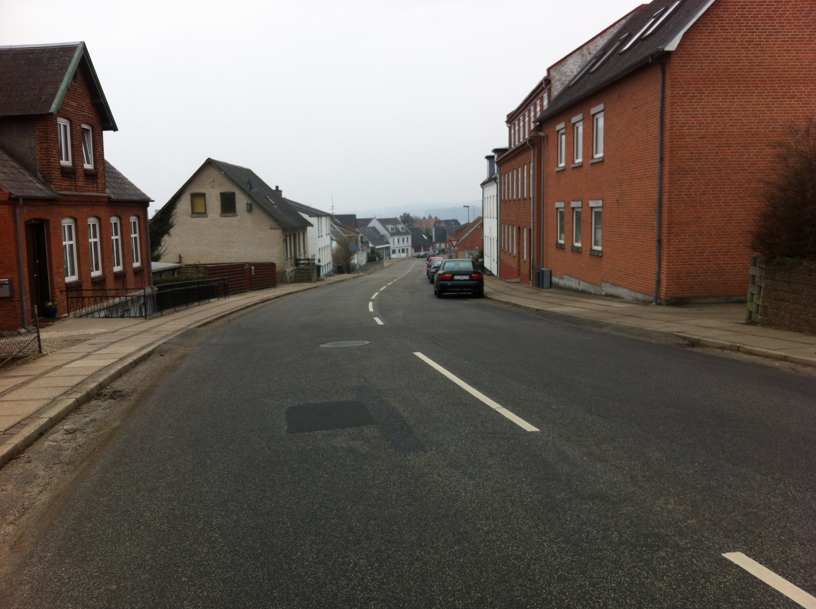 Nørregade i Hadsund